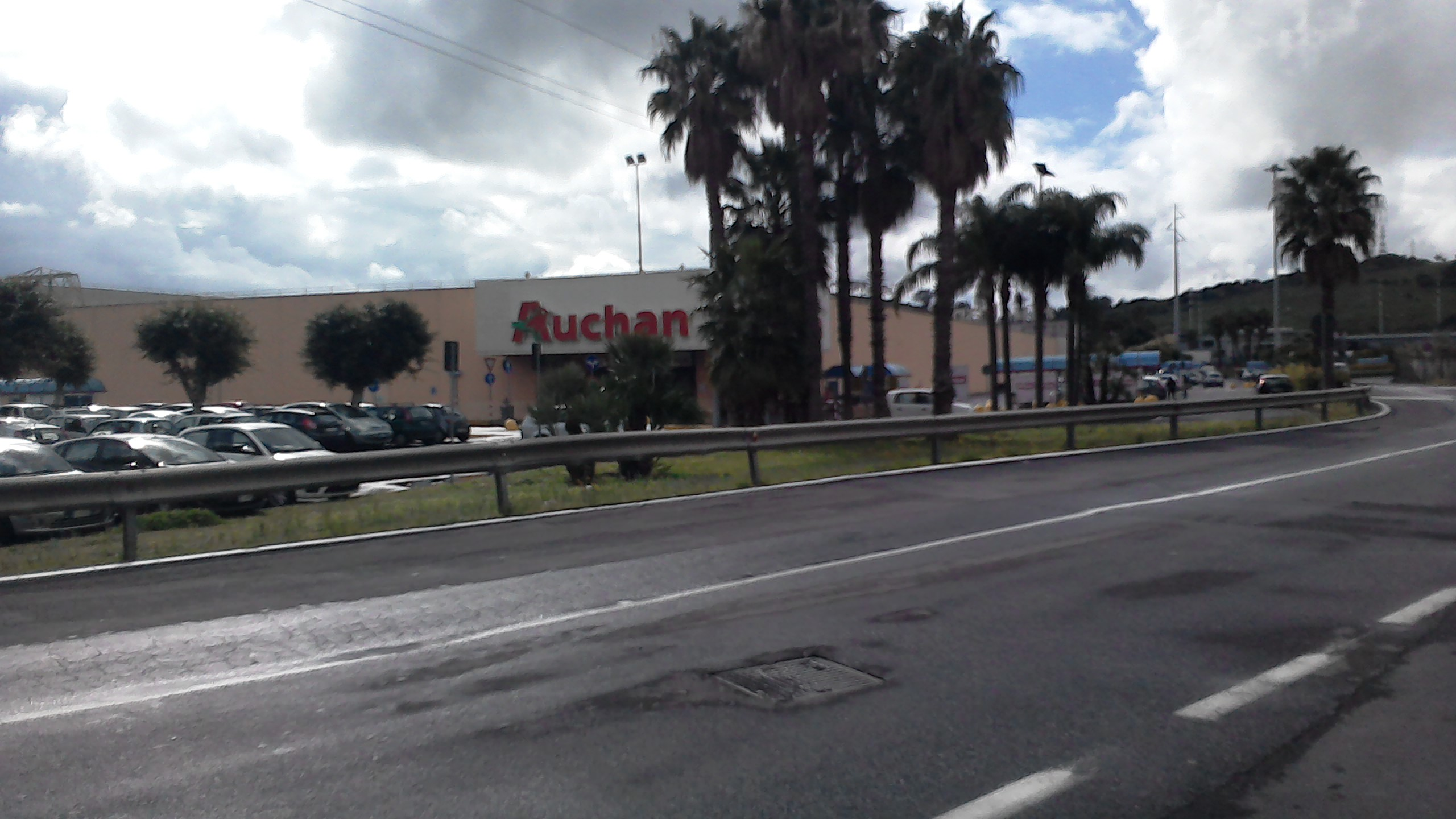 Il centro commerciale Auchan (ex CittàMercato) - Misterbianco